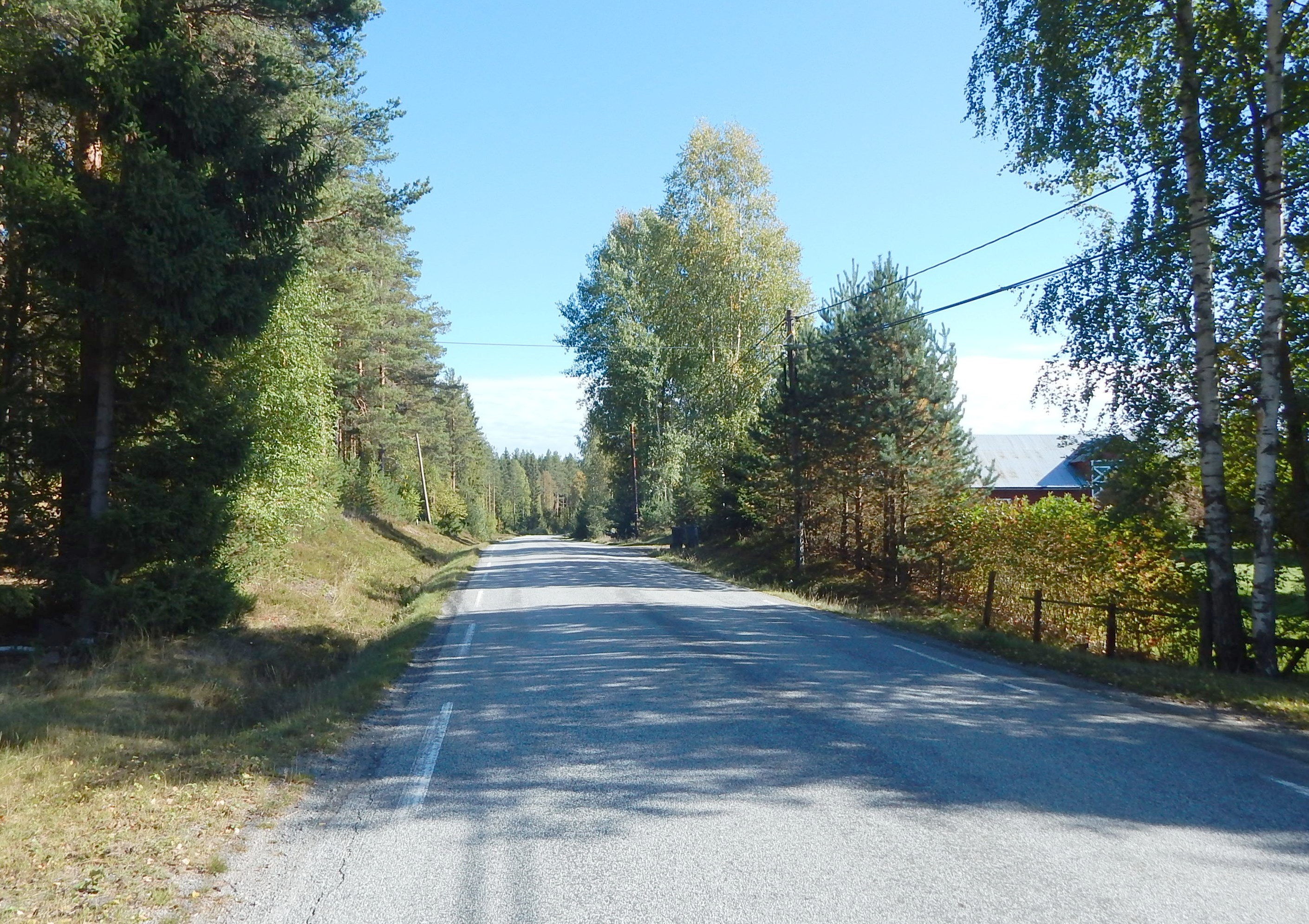 Rokosjøvegen (fylkesvei 1844, tidl. 166)